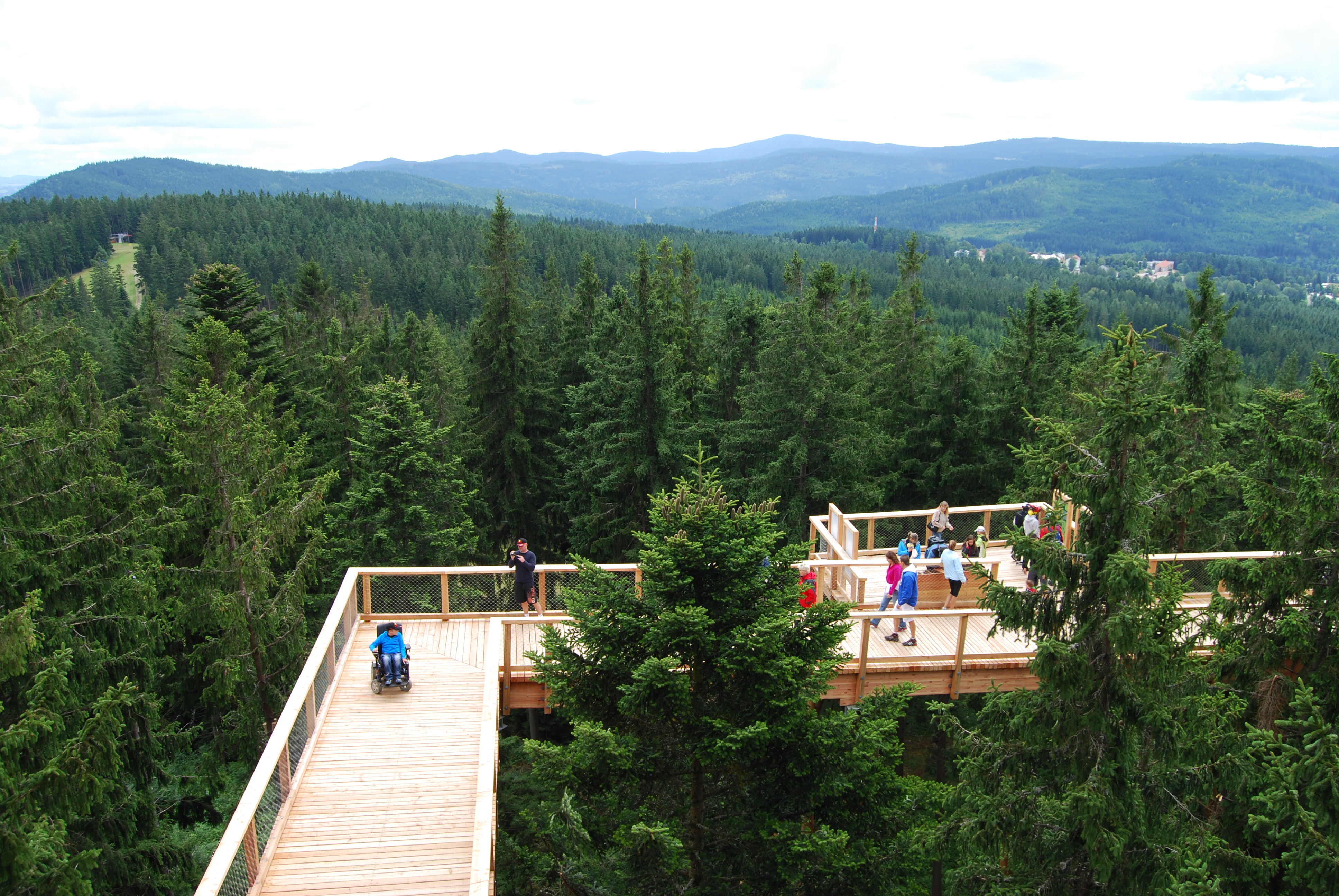 Stezka korunami stromů. Lipno nad Vltavou. Okres Český Krumlov. Česká republika.